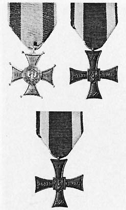 ordery Stanisława Zbigniewa Franczaka